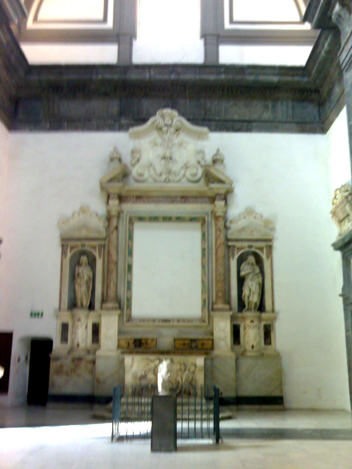 Chiesa di San Severo al Pendino (Napoli) - Il sepolcro di Bisvallo